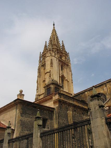 Catedral de Oviedo, Asturias, España